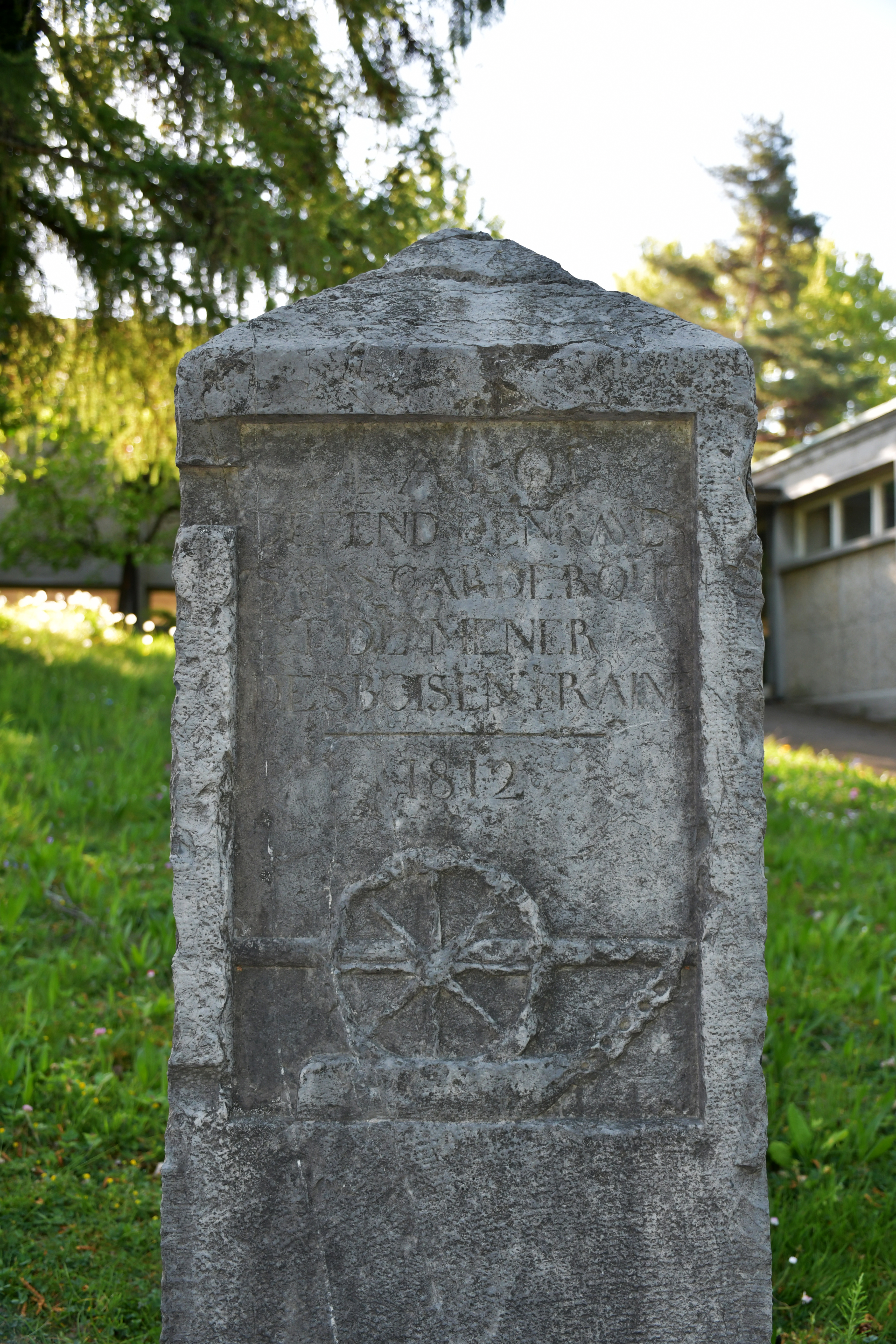 Borne de signalisation routière située sur l'avenue de la Sallaz, à Lausanne (Suisse). Datant de 1812, alors que l'avenue s'appelait route de Berne, cette borne demande aux charretiers de ne pas bloquer leurs roues dans la descente sans sabots, ni de freiner en faisant traîner des troncs, et cela pour éviter la formation d'ornières. Le texte gravé dit : La loi défend d'enrayer sans garderoue et de mener des bois en traîne – 1812.